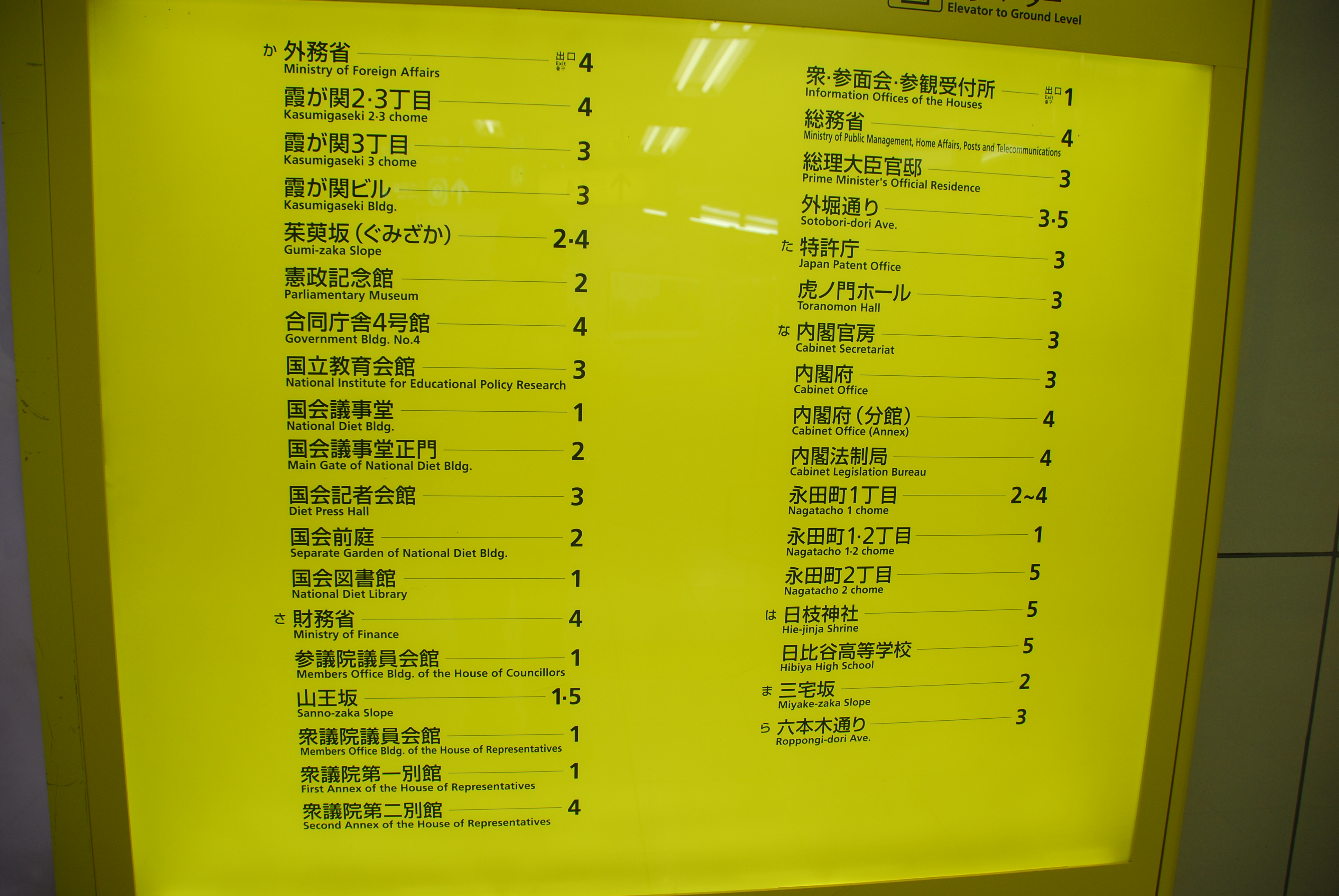 東京地鐵國會議事堂前站周邊設施